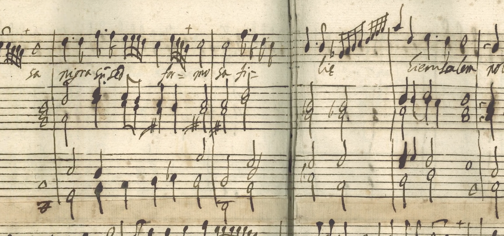 Incipit de la partition du Nigra Sum de Carlo G, extrait du manuscrit.